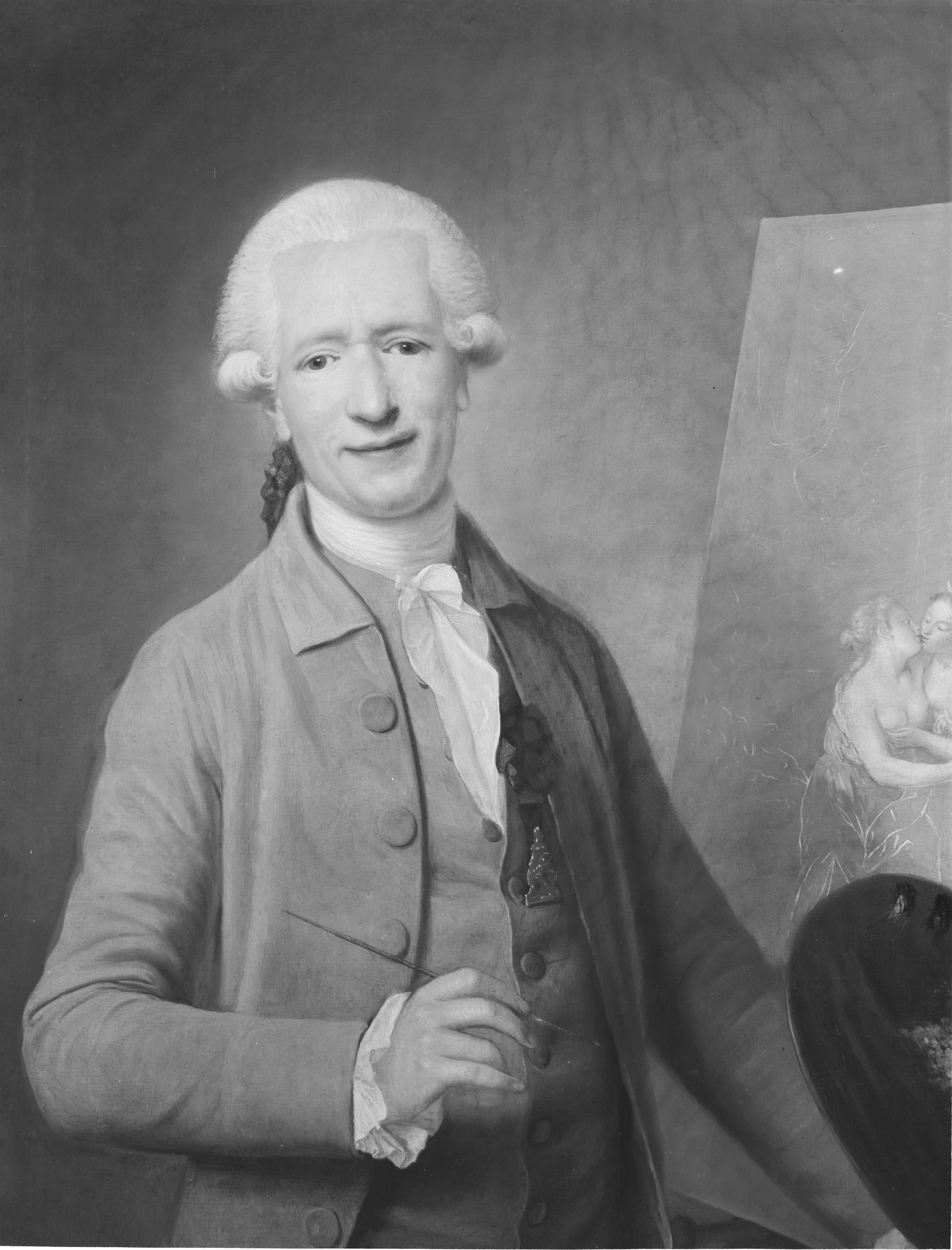 Zelfportret (detail) van Benjamin Bolomey